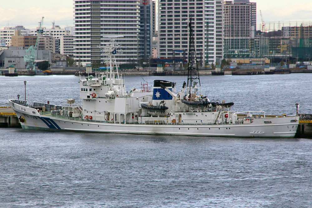 Japan Coast Guard PL 109 Shikine. (Patrol vessel), yokohama, japan.